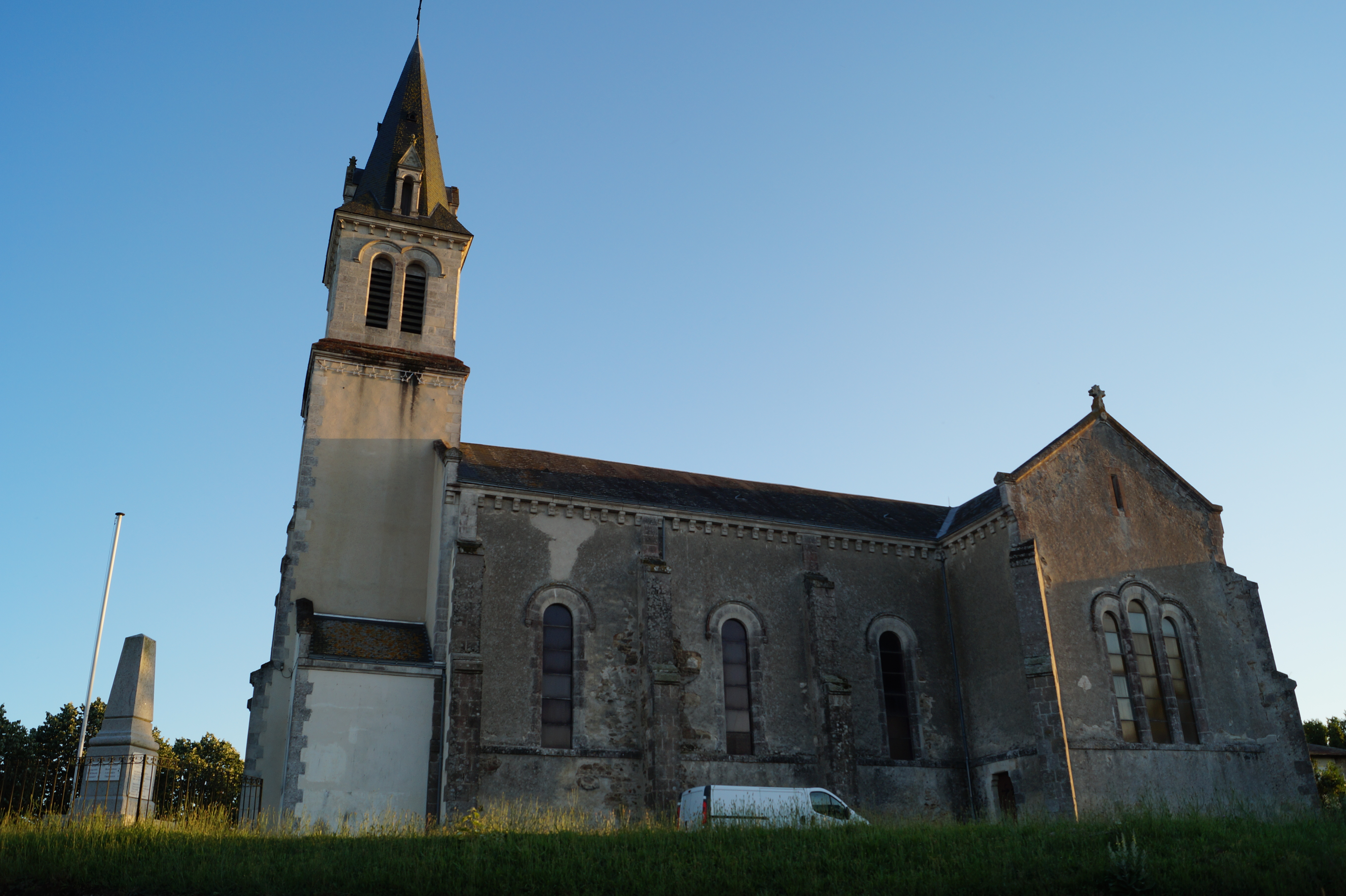 L’église Sainte-Melaine du Tablier depuis la rue des Charmes.